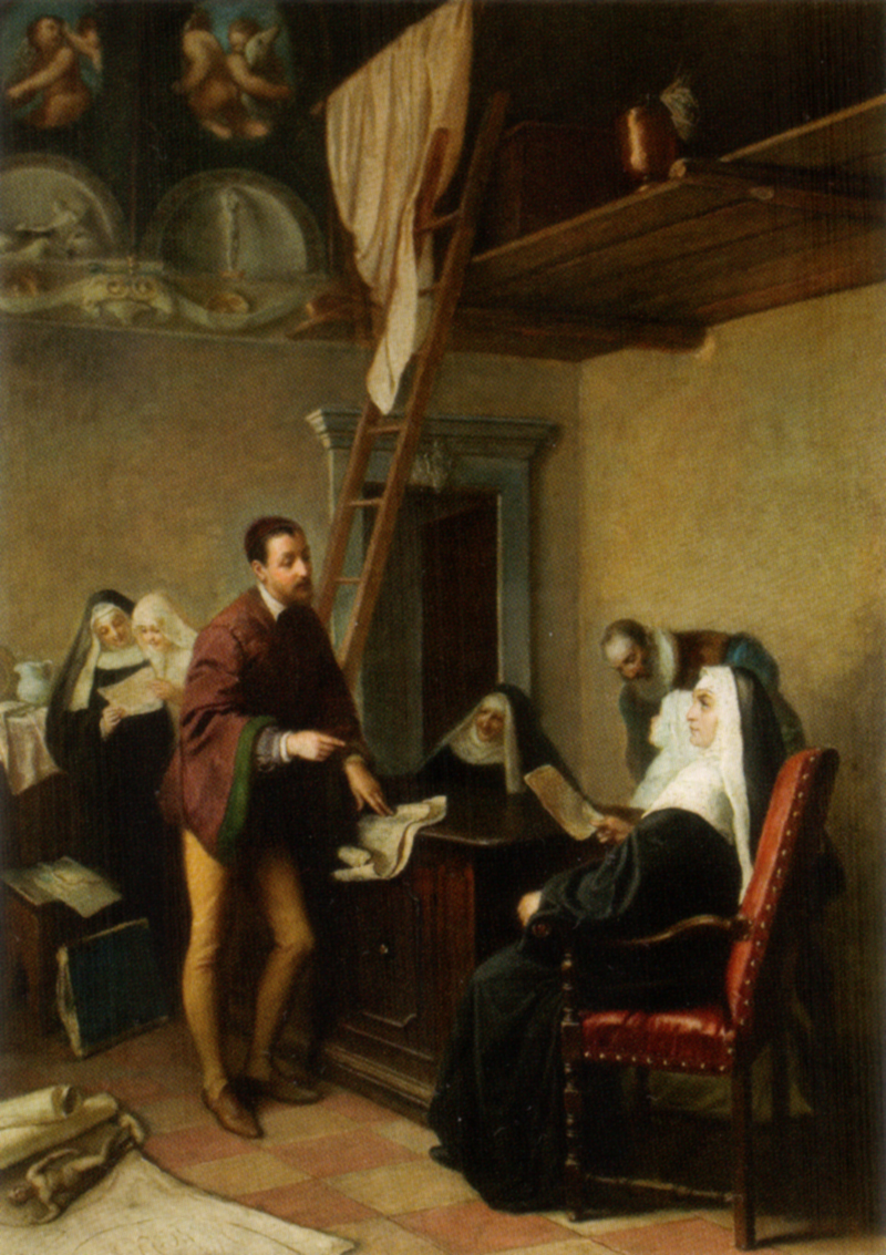 Giorgio scherer (1831-1896), il correggio e la badessa giovanna